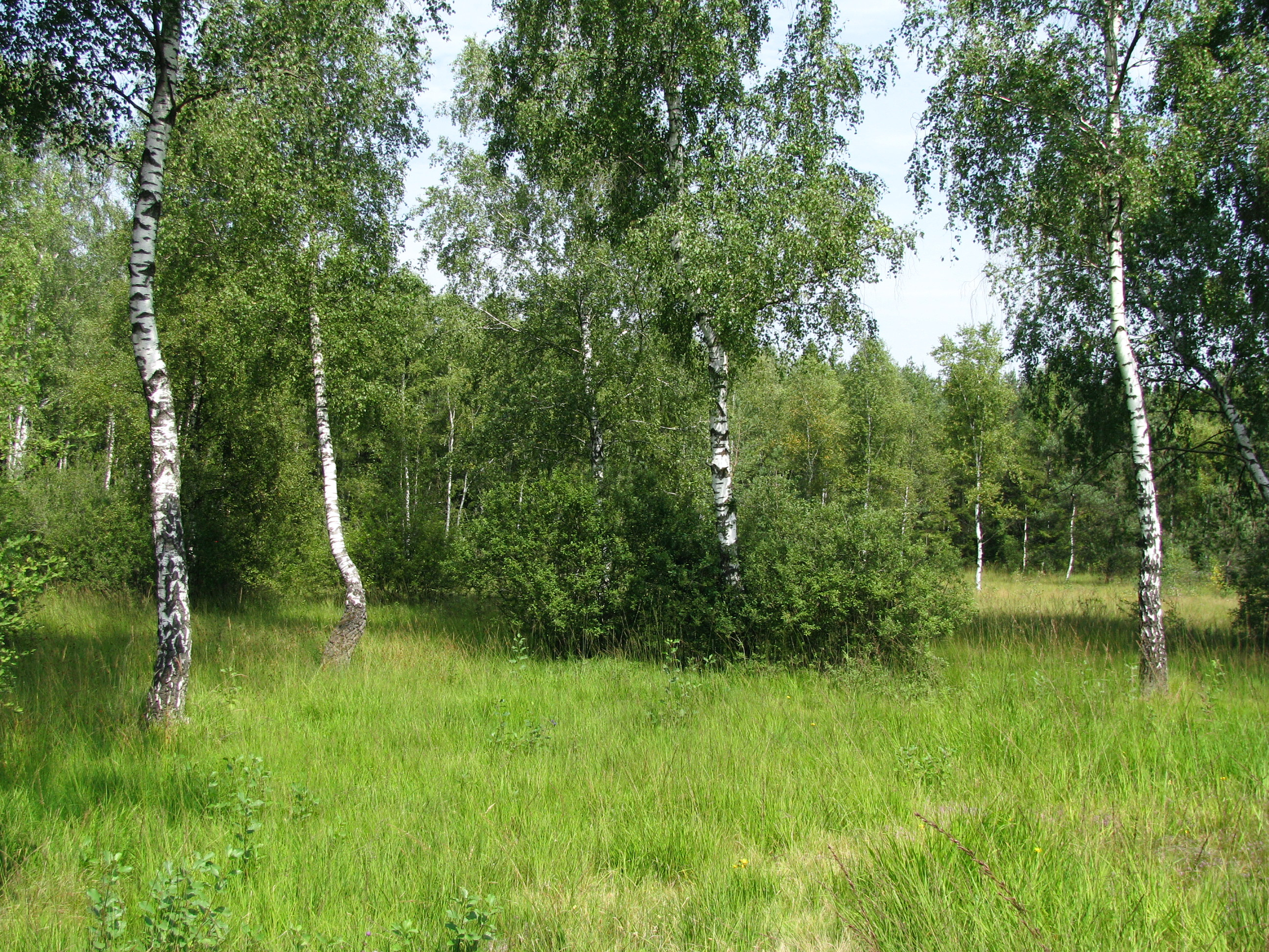 NSG Wildmoos